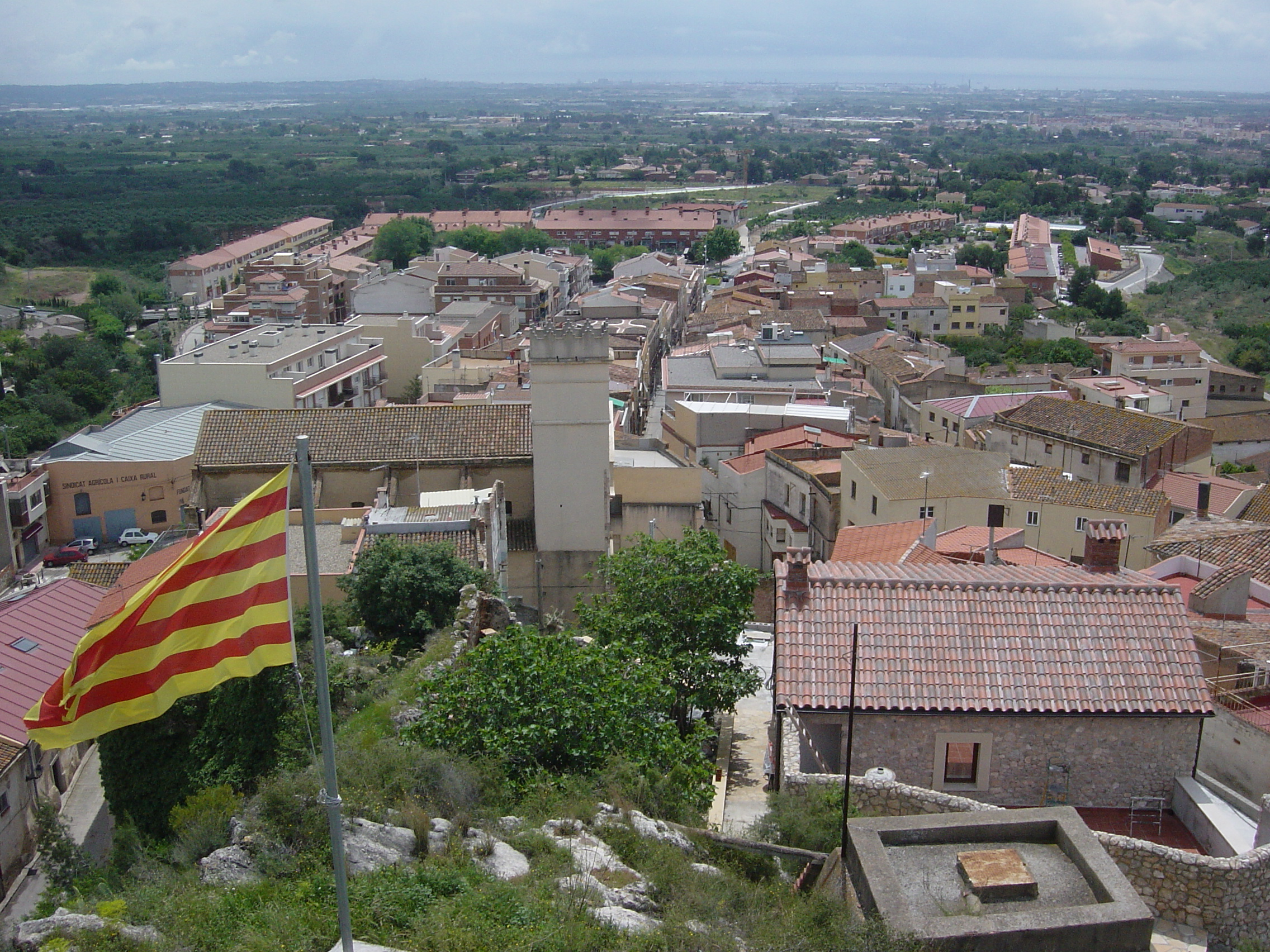 Castellvell del Camp des de l'ermita de Santa Anna